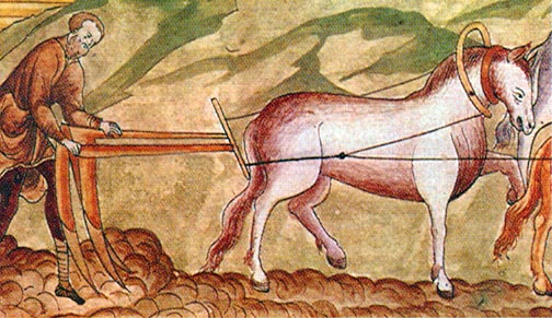 Пахота. "Житие Сергия Радонежского". Фрагмент миниатюры. Конец XVI в. // Рябцев Ю. С. Путешествие в историю старой русской жизни. - М., 200